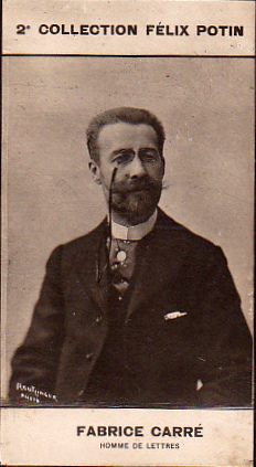 Carré, Fabrice